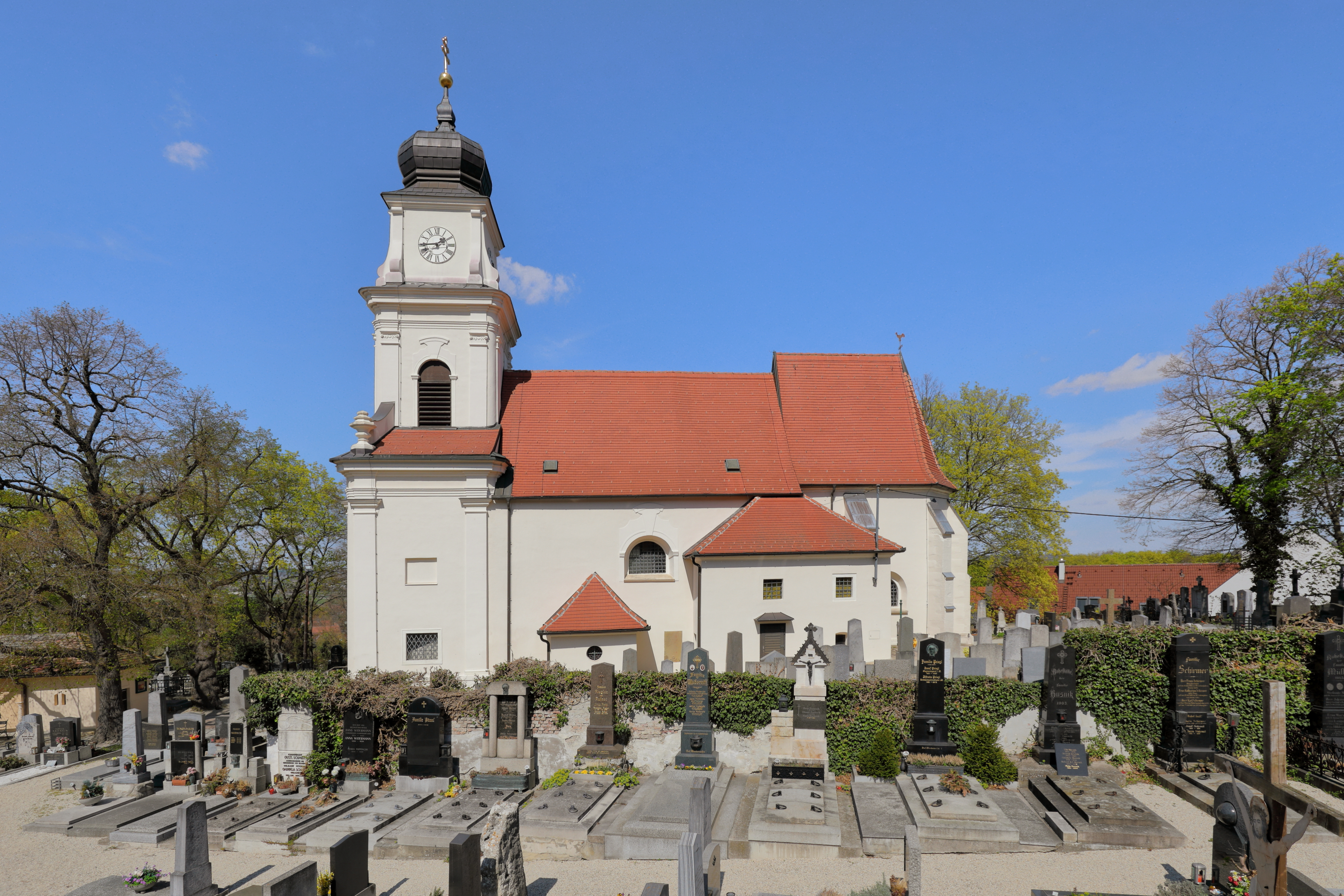 Südansicht der röm.-kath. Pfarrkirche hl. Johannes der Täufer in der niederösterreichischen Marktgemeinde Bisamberg.Die Kirche steht erhöht über dem Ort am nordwestlichen Abhang des Bisamberges und ist von einem Friedhof umgeben. Sie ist eine im Kern romanische, barockisierte Saalkirche mit spätgotischem Chor und spätbarockem Westturm. Der tiefe Fassadenvorbau mit Turm wurde von 1720 bis 1735 errichtet.